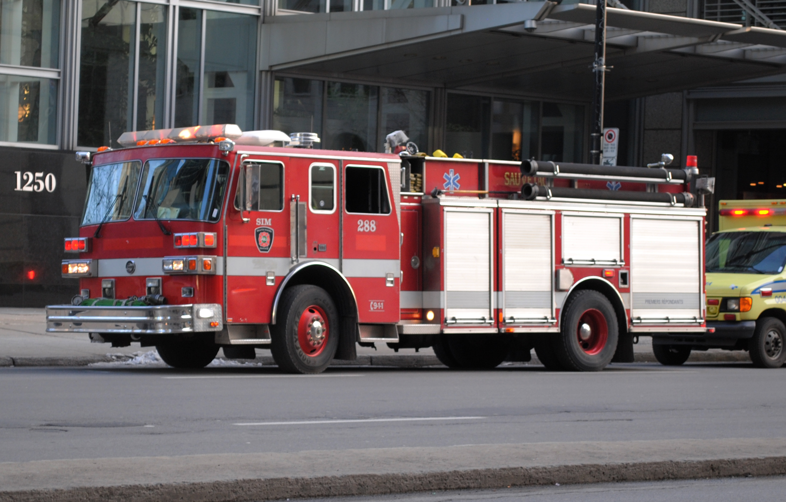 Autopompe 288, Service de sécurité incendie de Montréal - Camion